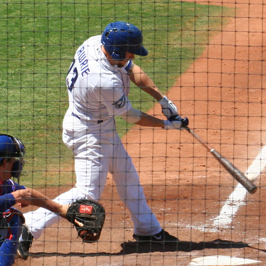 Brett Lawrie